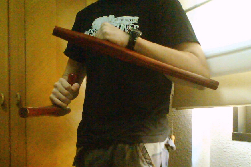 Practicante de Kobudo utilizando un par de tonfas